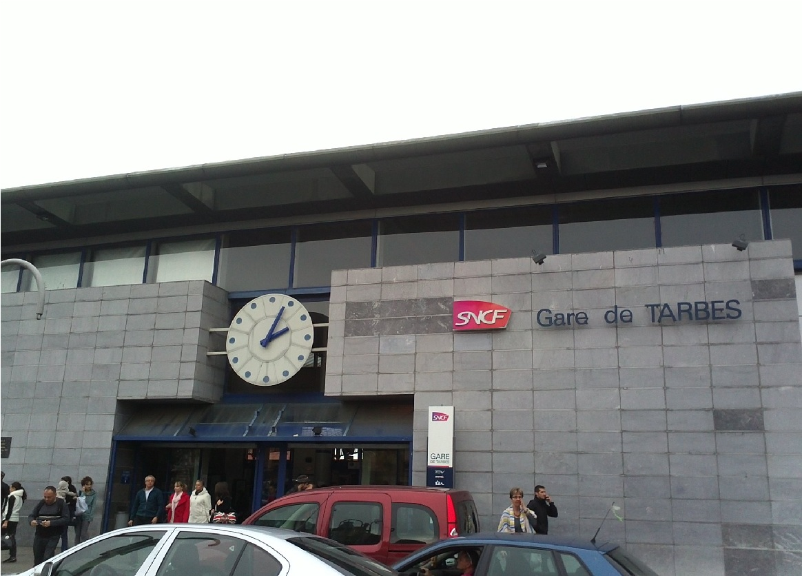 塔布站（Gare de Tarbes）